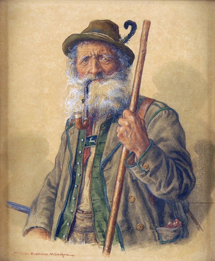 Bayerisches Urgestein. Signiert. Aquarell. 21,5 x 18 cm